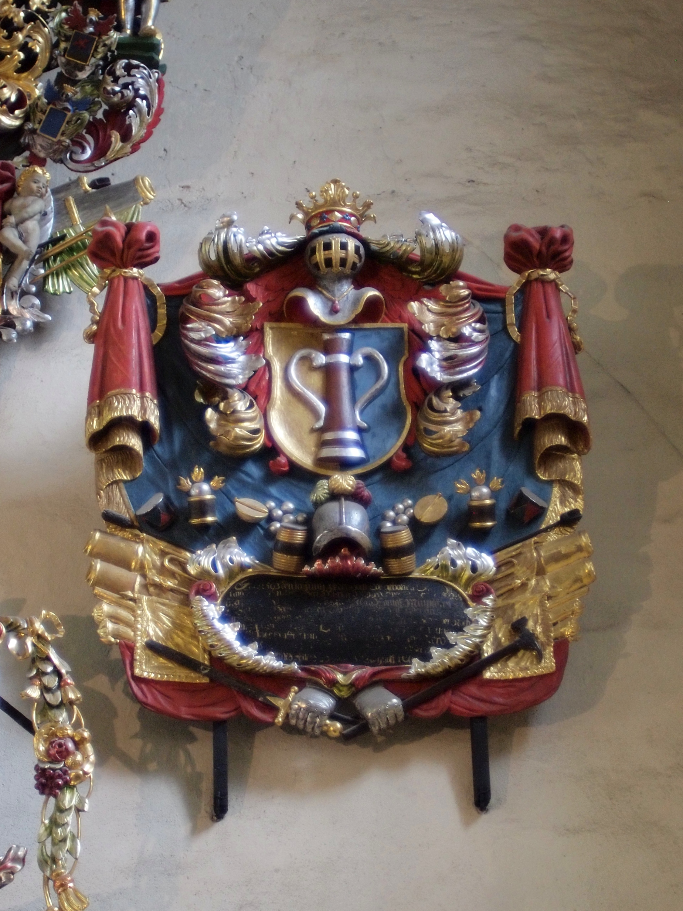 Eestimaa aadliku ja Rootsi ohvitseri Heinrich von Knorringi vappepitaaf Niguliste kirikus